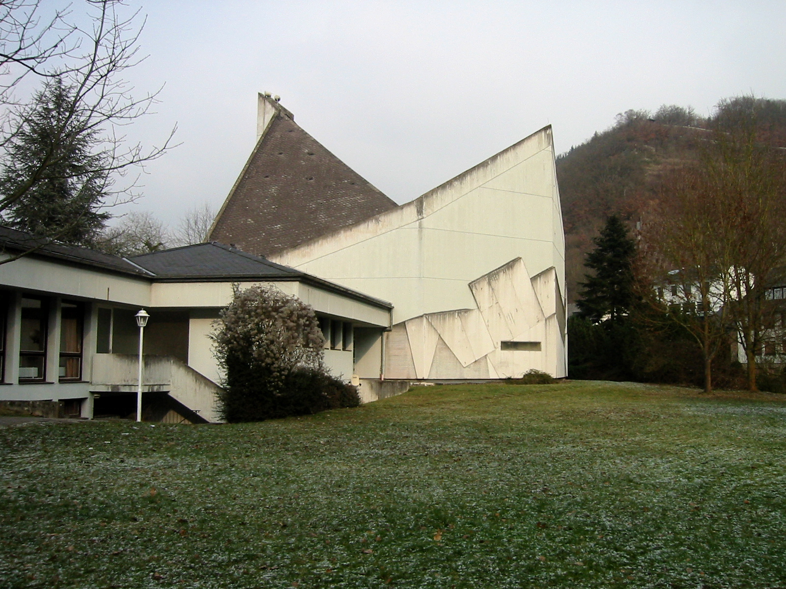 Kath. Kirche "Vom Heiligen Kreuz" in Brodenbach. Erbaut 1971-1973 vom Bistum Trier und der Kirchengemeinde Alken-Brodenbach. Architekt Werner Köster, Düsseldorf.